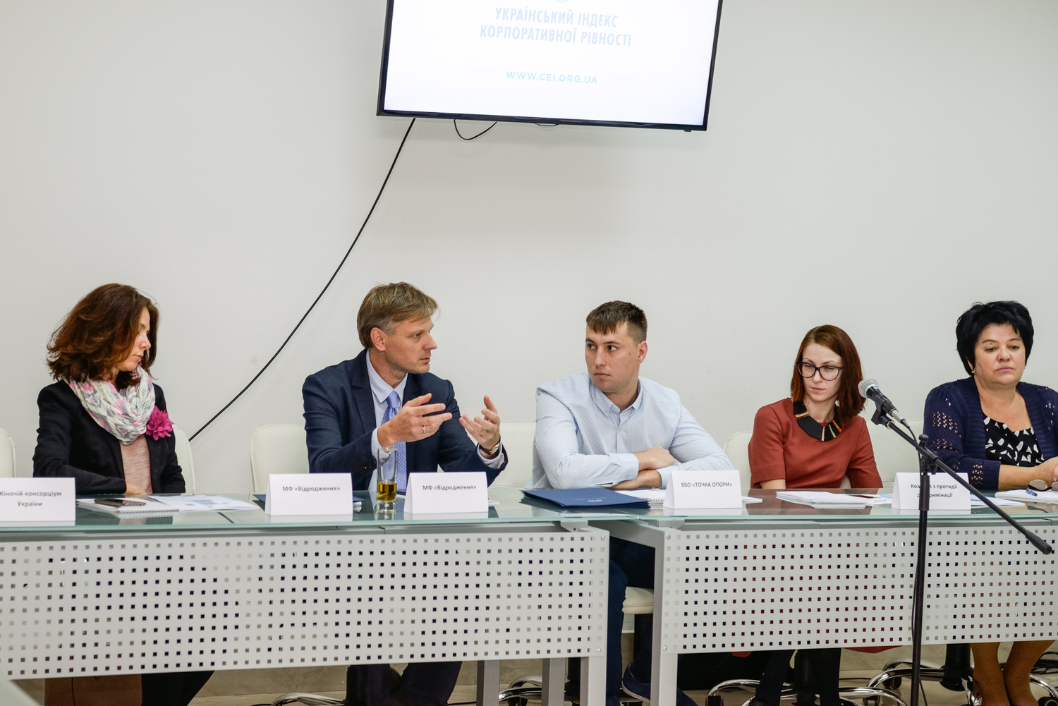 фото з презентації публікації